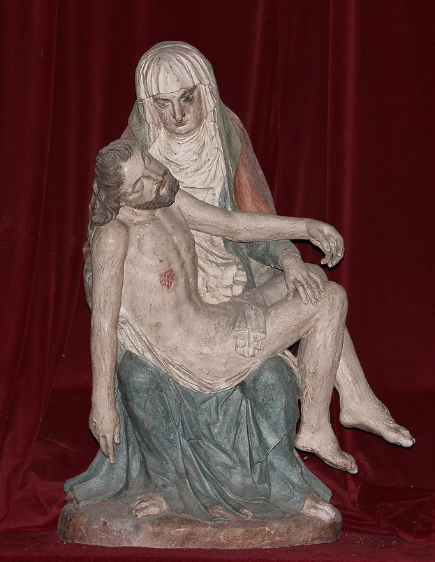 Eglise Saint Etienne d'Ainay le Château, Piéta